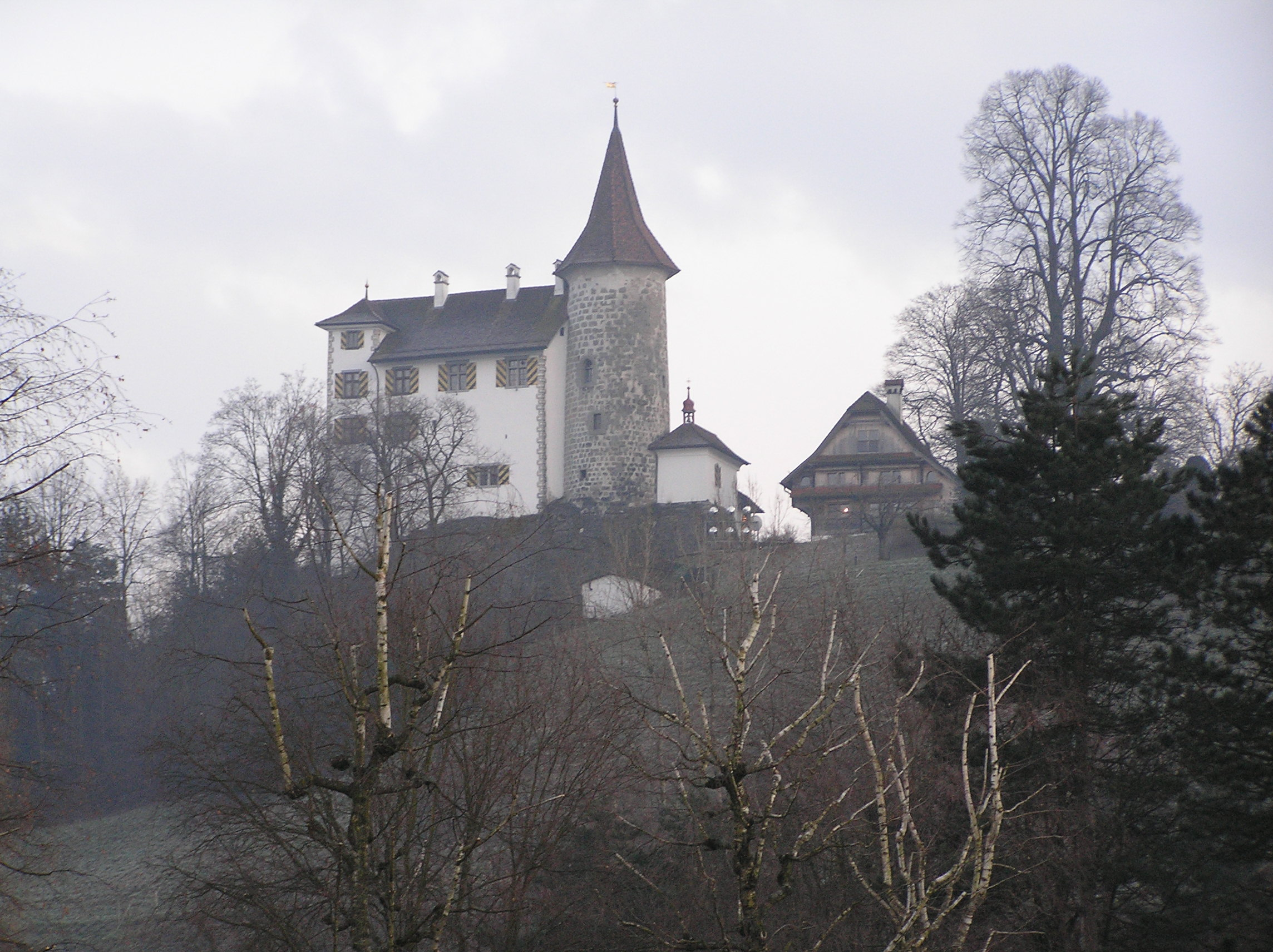 Schloss Schauensee in Kriens